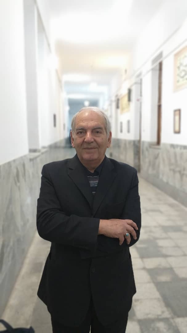 نویسنده و مترجم ایرانی